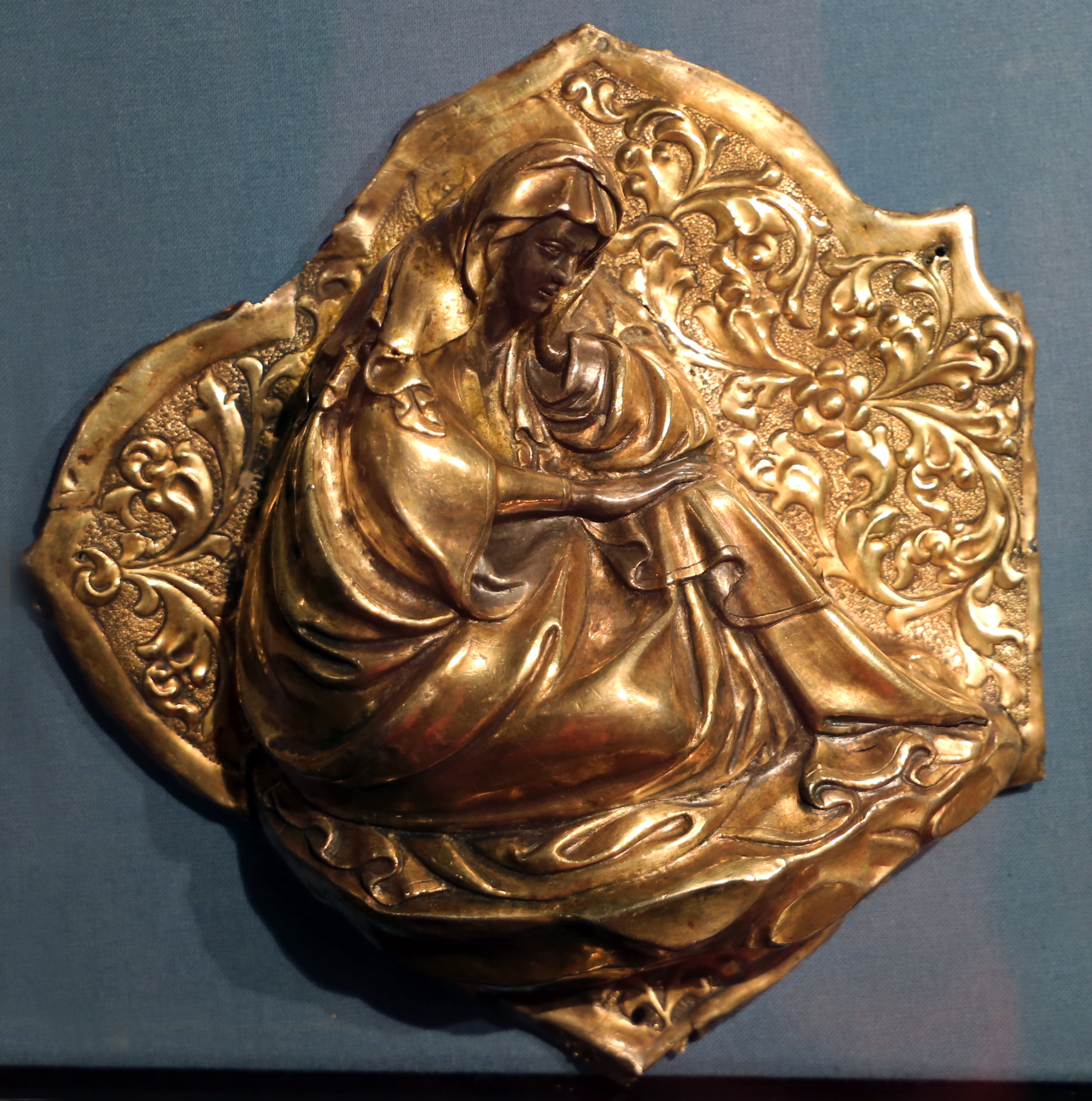 Piazza Santa Maria Maggiore This is a photo of a monument which is part of cultural heritage of Italy.